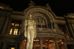 A lo mejor del cine mexicano